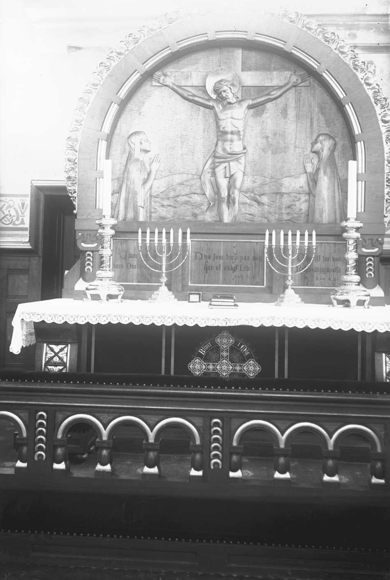 Alteret i Fagerborg kirke (altertavle ved Jo Visdal). Foto: Esther Langberg, 1930. Fra Byhistorisk samling hos Oslo Museum.